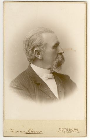 Porträtt av Brynolf Wennerberg d ä, ca 1880. Fotograf: James Bourn